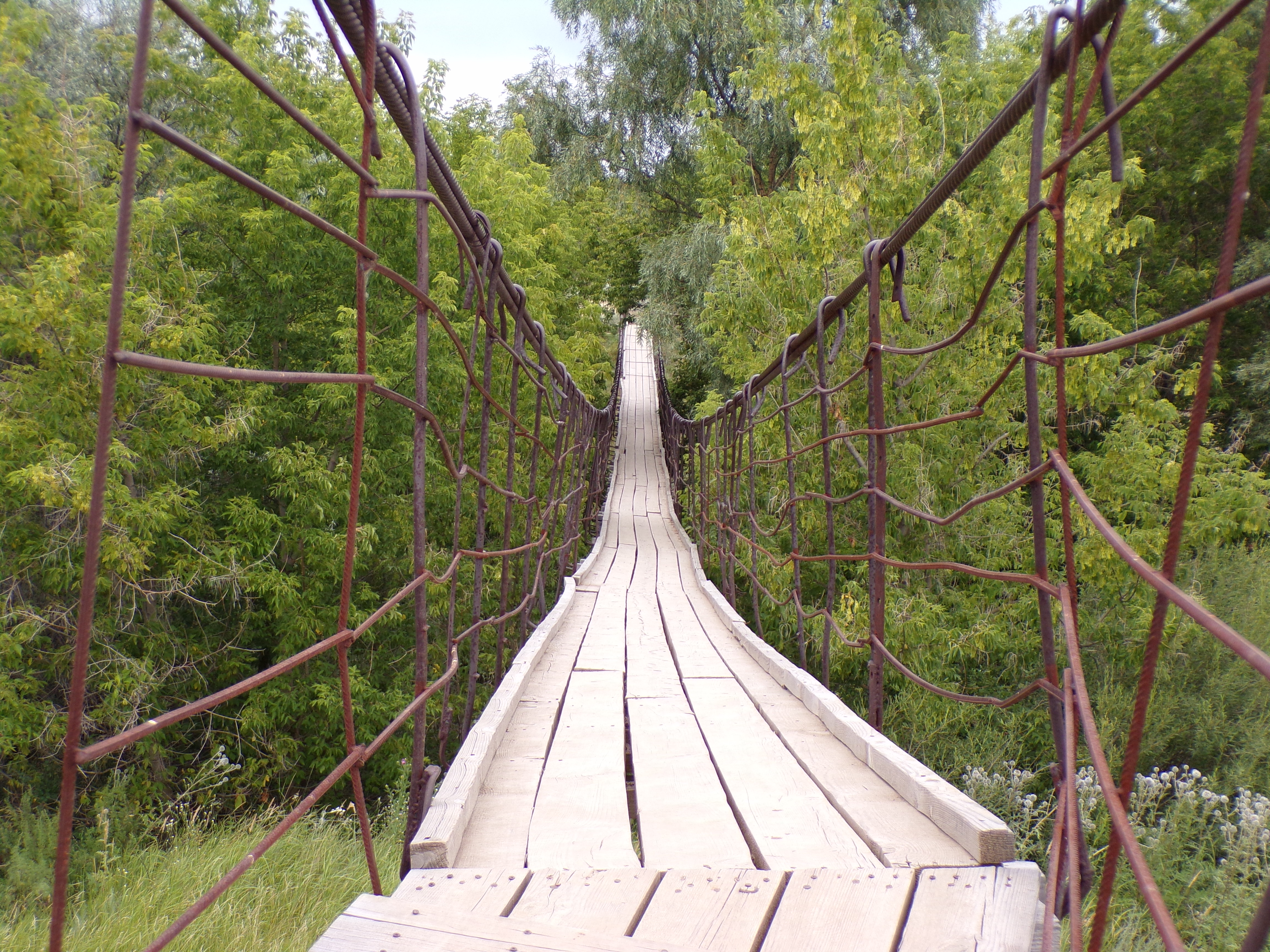 Висячий мост в селе Липовка через реку Большой Караман